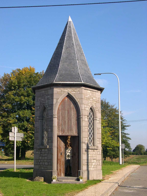 Chapelle Saint Roch (19e siècle), chaussée de Louvain, 790 à 5020 Champion (Namur, Belgique)